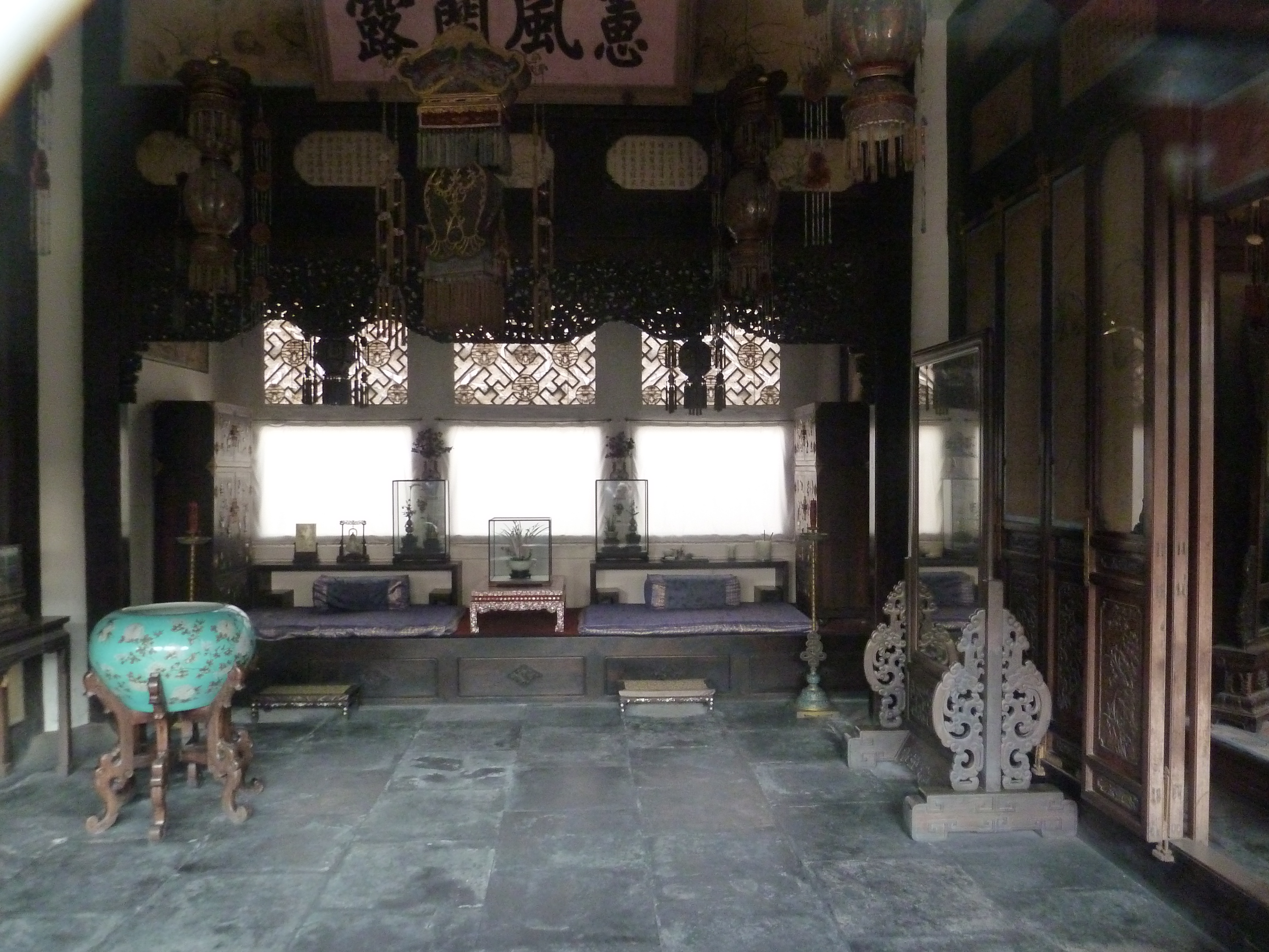 Dans la Cité_interdite, à Pékin .- ,Chine